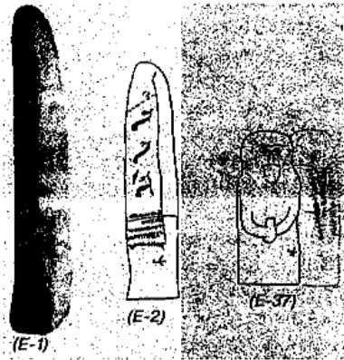 Енисейские письменные памятники. ХVII—ХVIII век